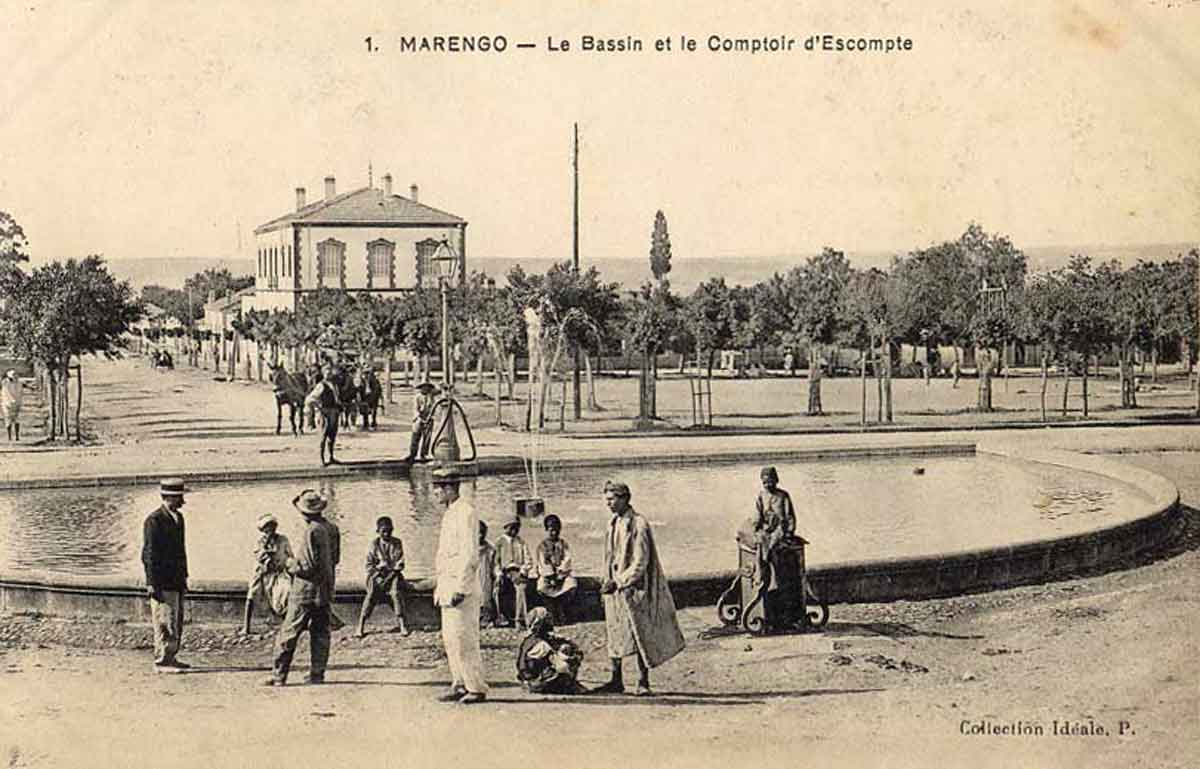 Marengo, Le bassin et le comptoir d'Escompte (Algérie)